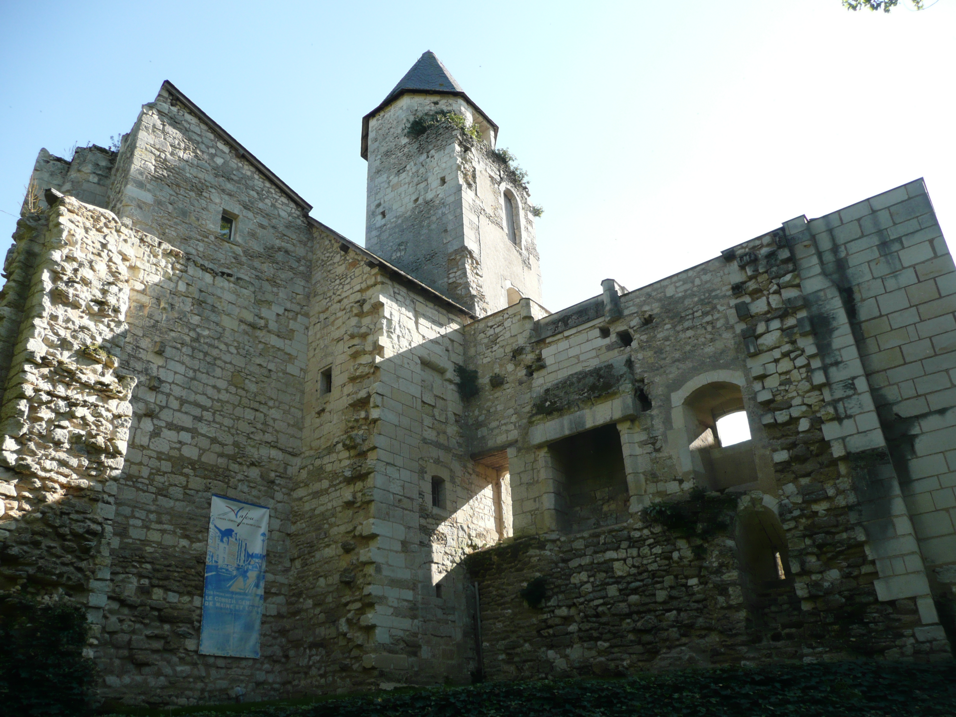 Ambillou-Château - Chateau This building is en partie classé, en partie inscrit au titre des Monuments Historiques. .